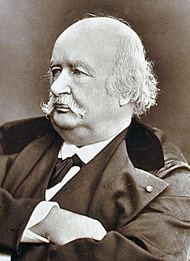 Jules Sandeau circa 1880